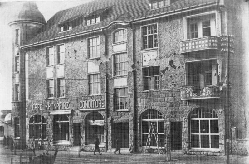 China, Kiautschou nach 1914 Splitterwirkung einer japan. 28 cm Haubitze